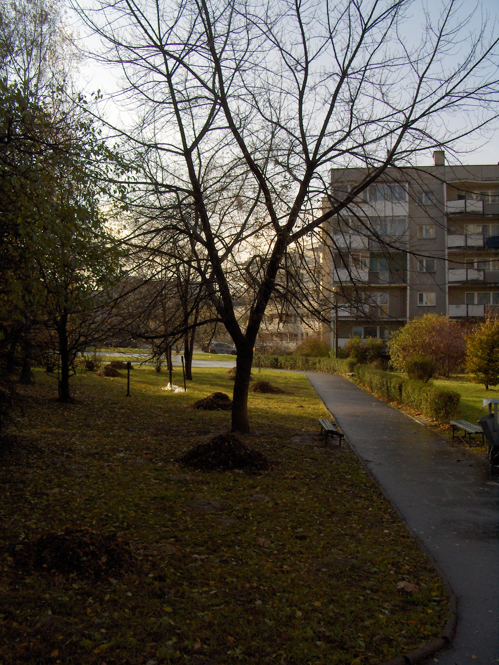 późna jesień na osiedlu Ruczaj-Zaborze , Kraków.